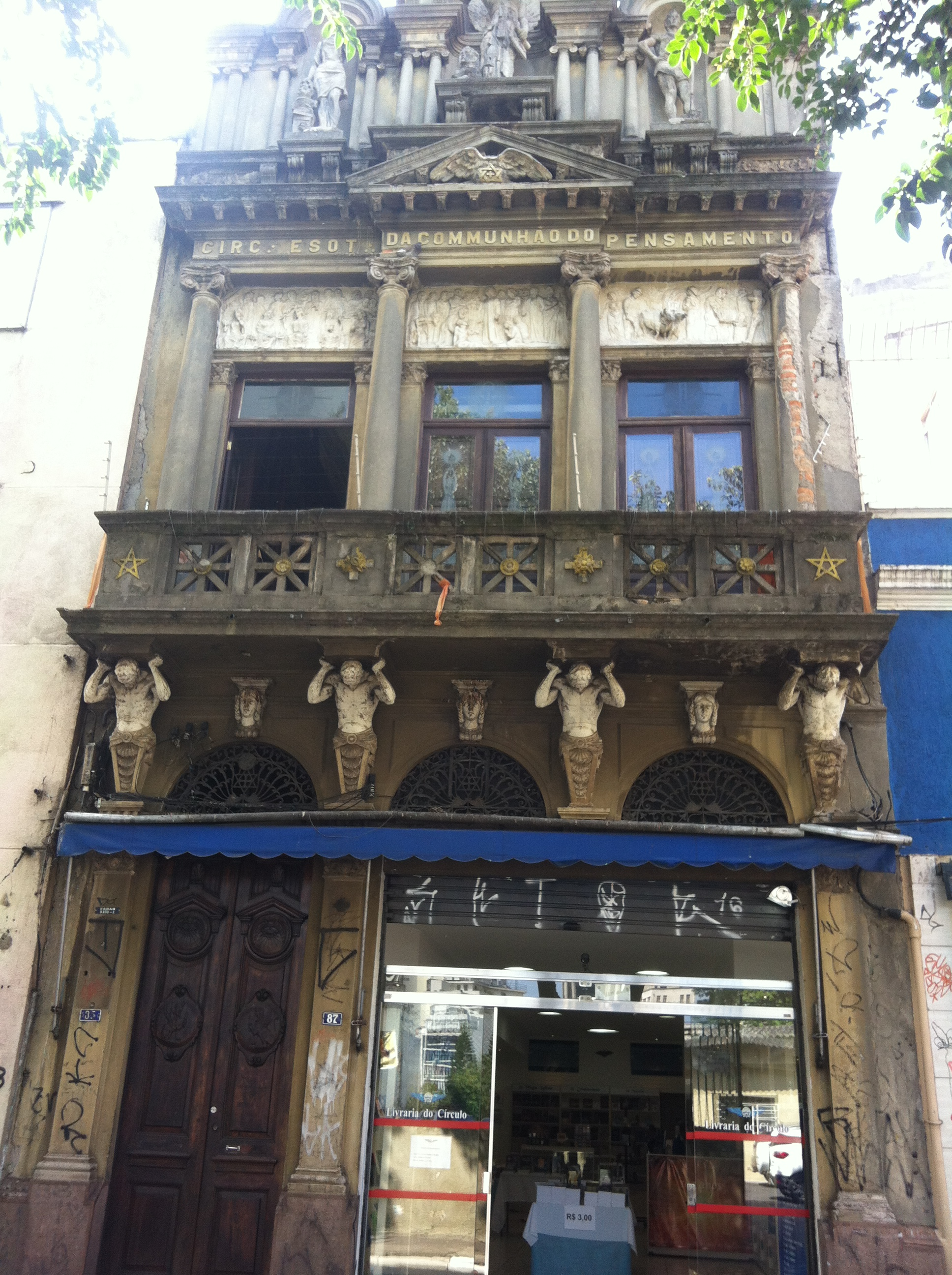 Prédio do Círculo Esotérico da Comunhão do Pensamento, no bairro da Liberdade, centro de São Paulo